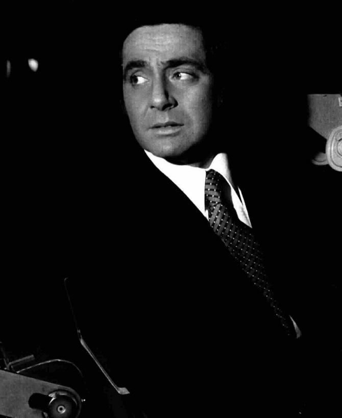 Italian presenter Corrado